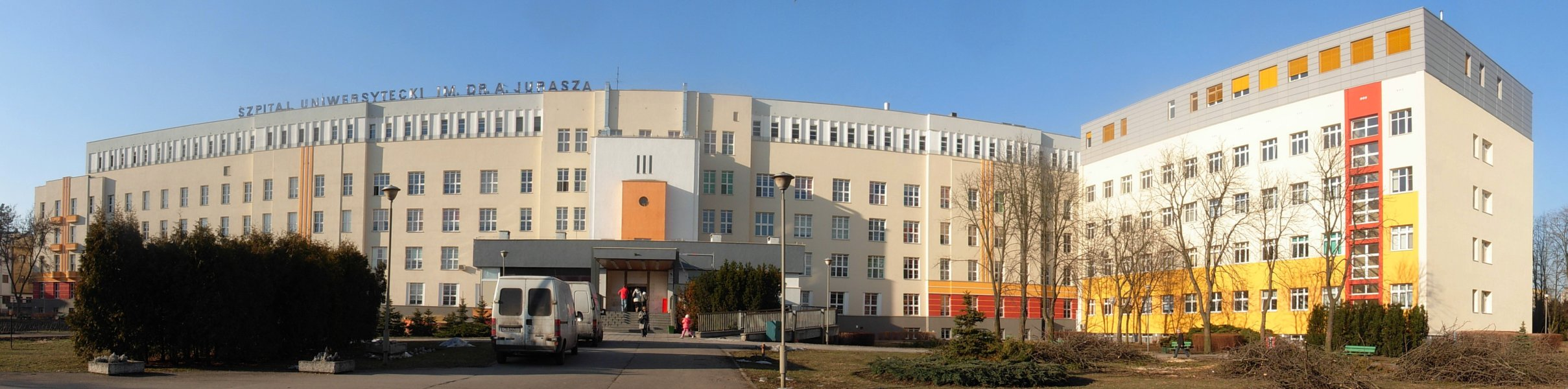 Szpital Uniwersytecki im Jurasza w Bydgoszczy